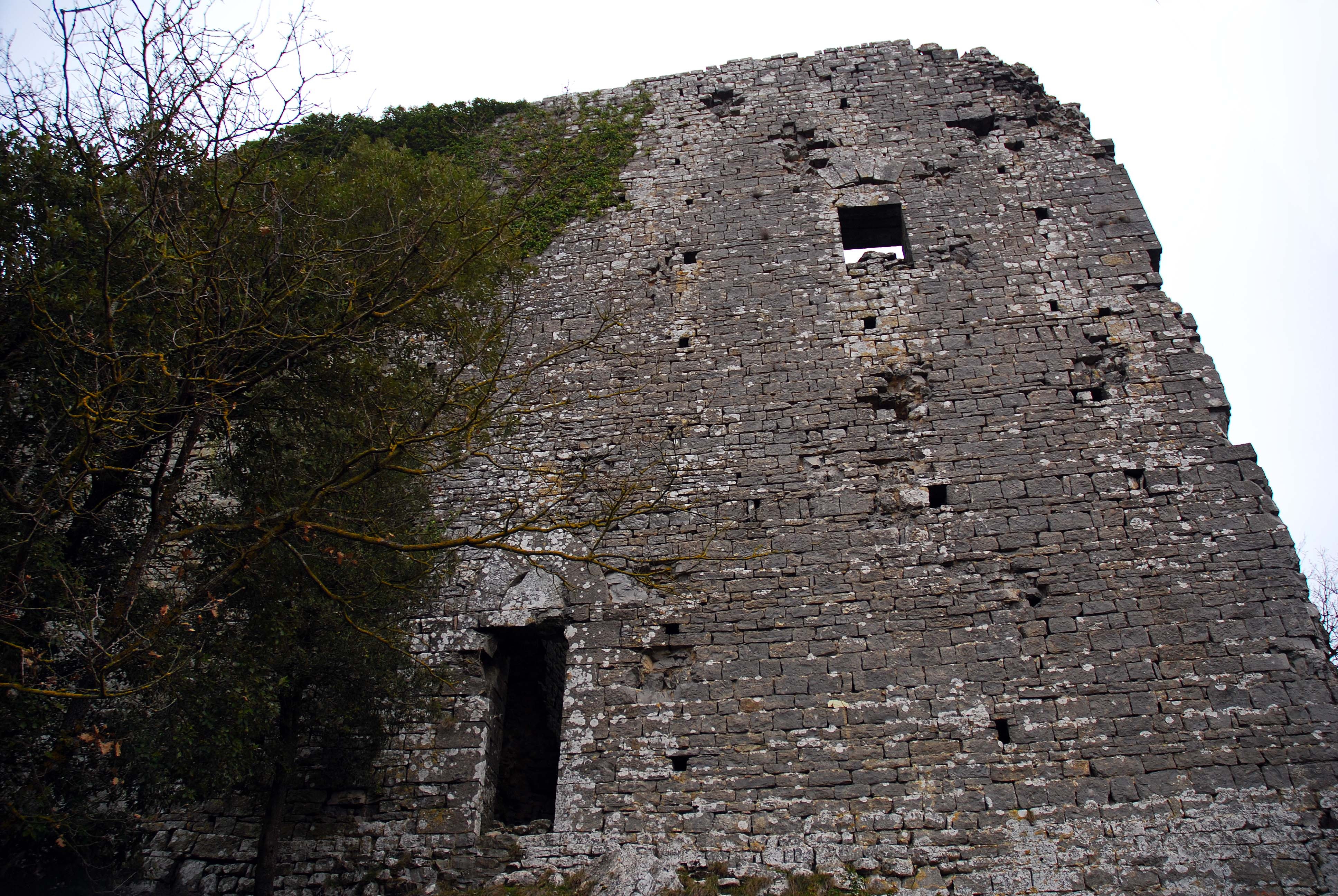 Castello di Montegrossoli, porta di accesso - Gaiole in Chianti - Siena